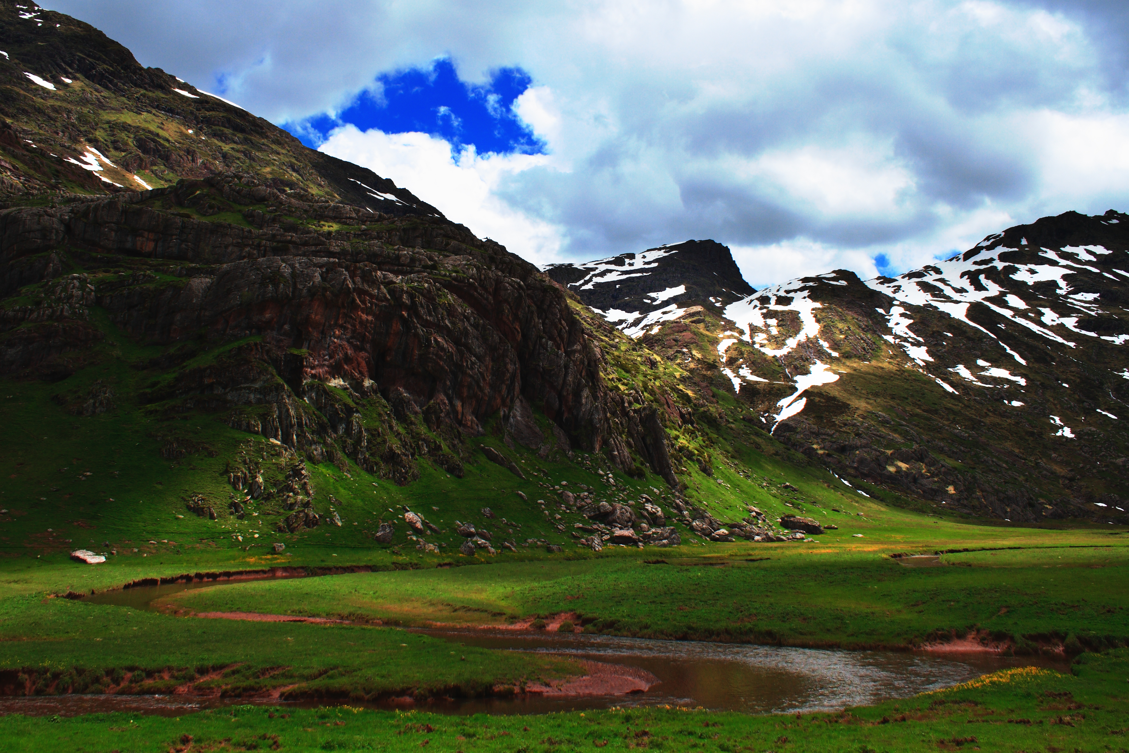 Parque natural de los Valles Occidentales This is a photography of a Special Area of Conservation in Spain with the ID: ES2410003. Natura2000 entry, EEA entry